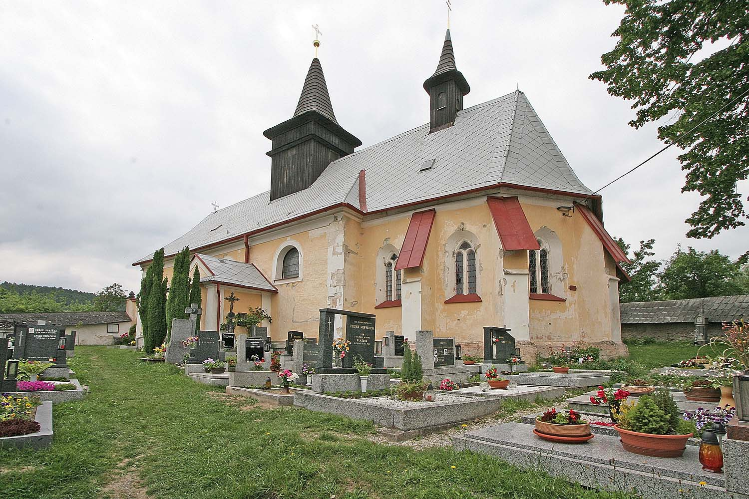 kostel svatého svatého Jana Křtitele v Širokém dole